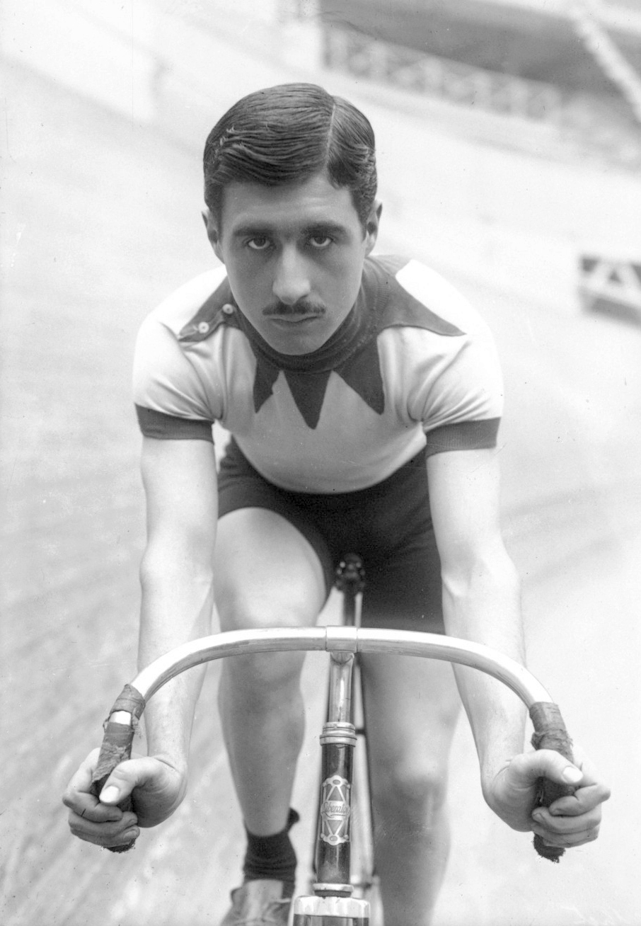 Berthet [portrait du coureur cycliste sur son vélo] : [photographie de presse] / [Agence Rol]